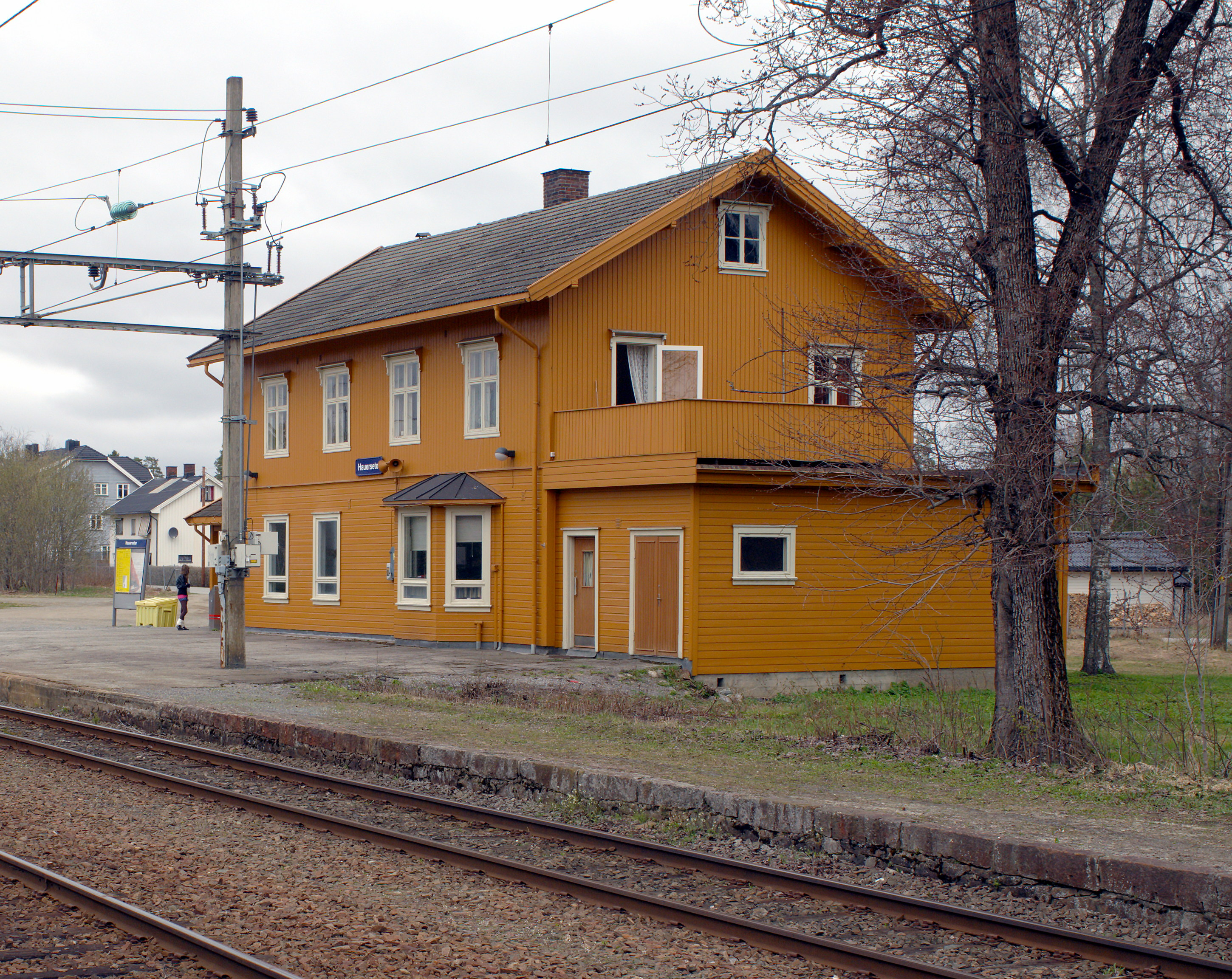 Hauerseter stasjon på Hovedbanen